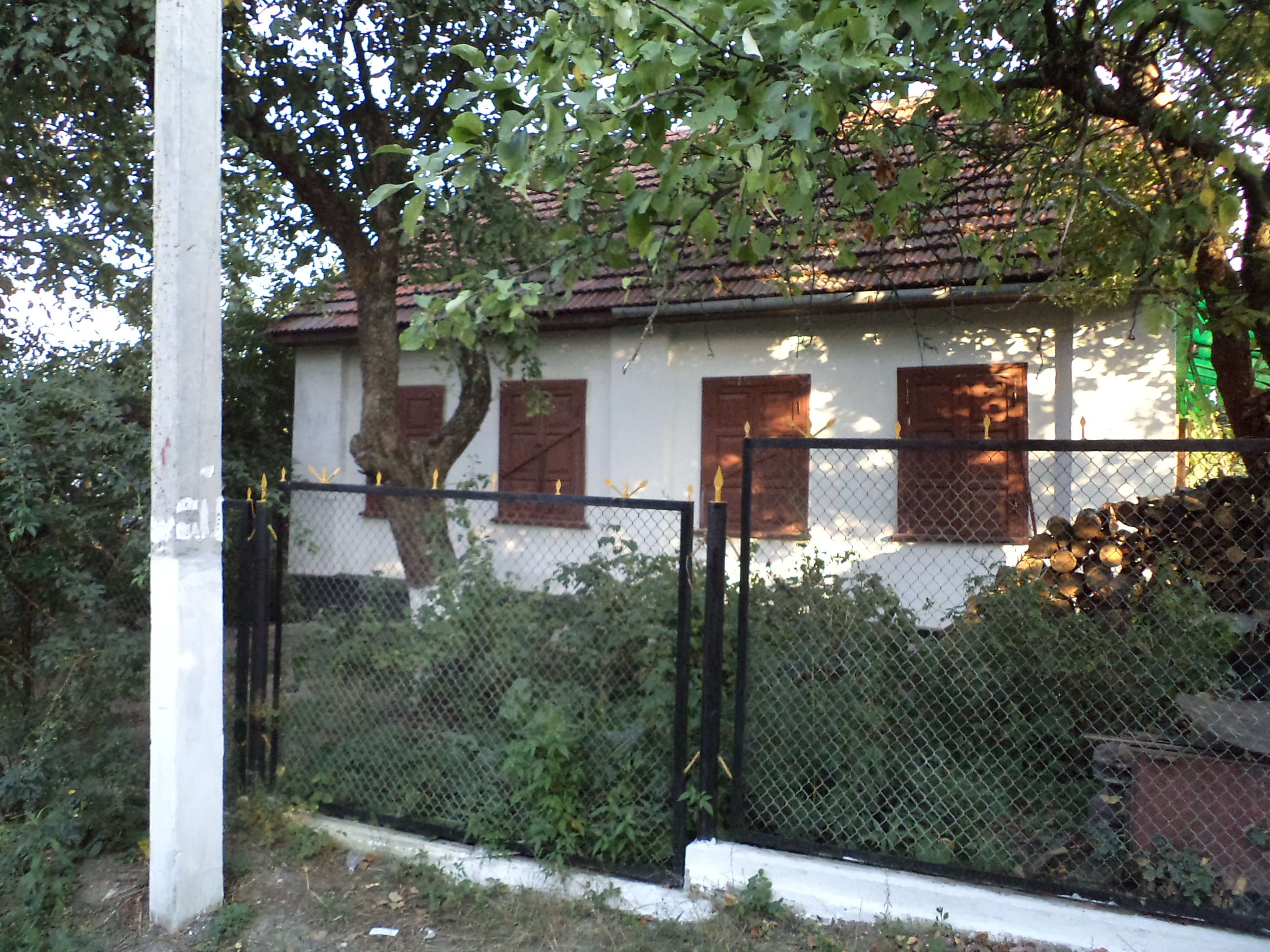 Дом в Яковцах (ул. Демократическая, 16), в архитектуре которого видны украинские народные традиции